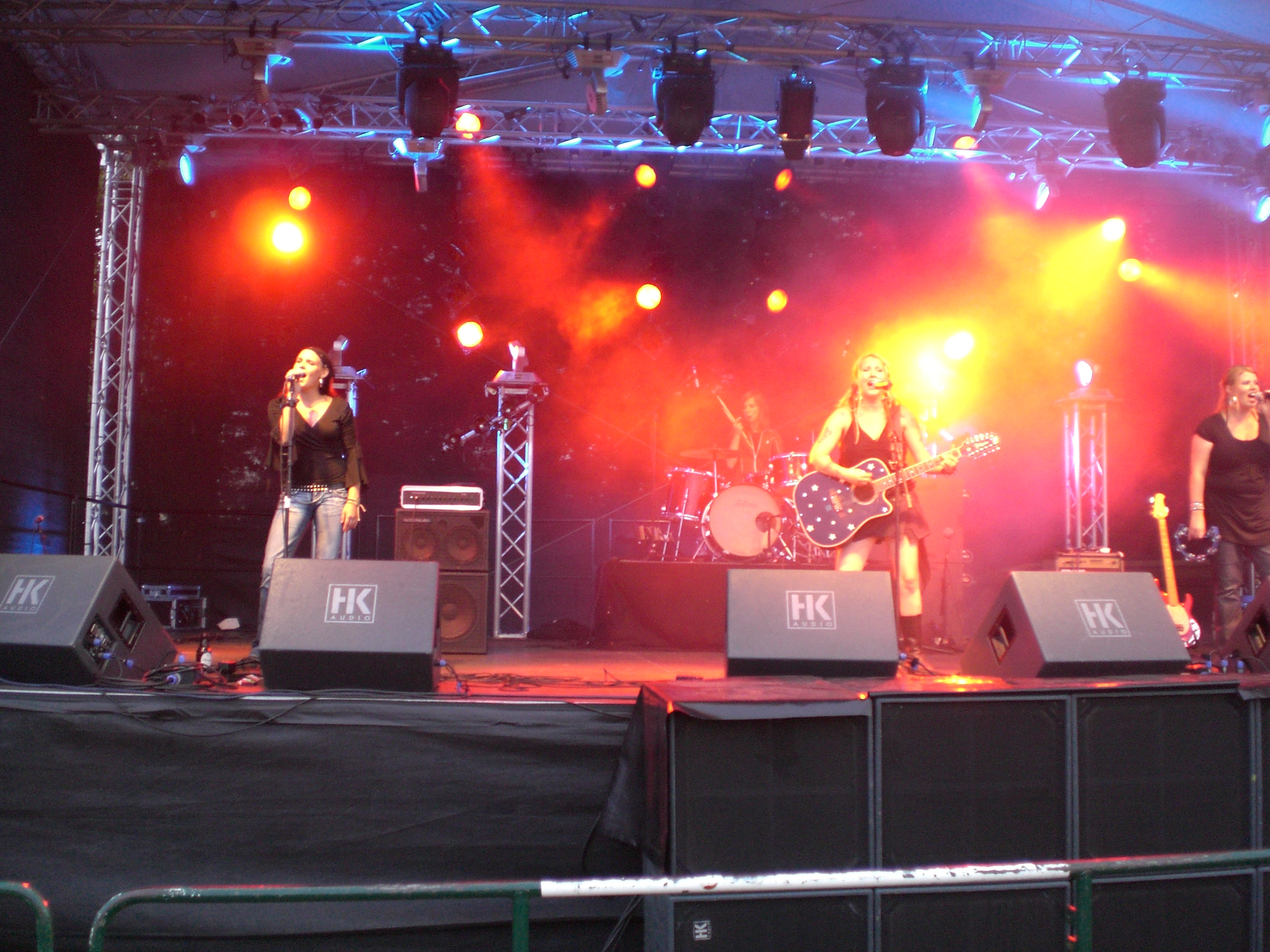 Lily Of The Valley, live auf dem Gesat-Festival 2007